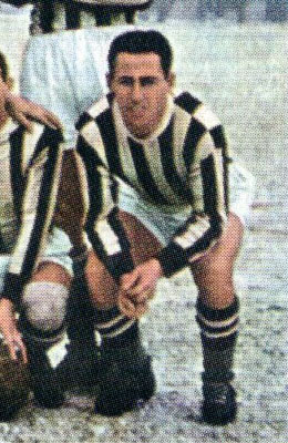 Il calciatore albanese Riza Lushta alla Juventus nella stagione 1940-41.